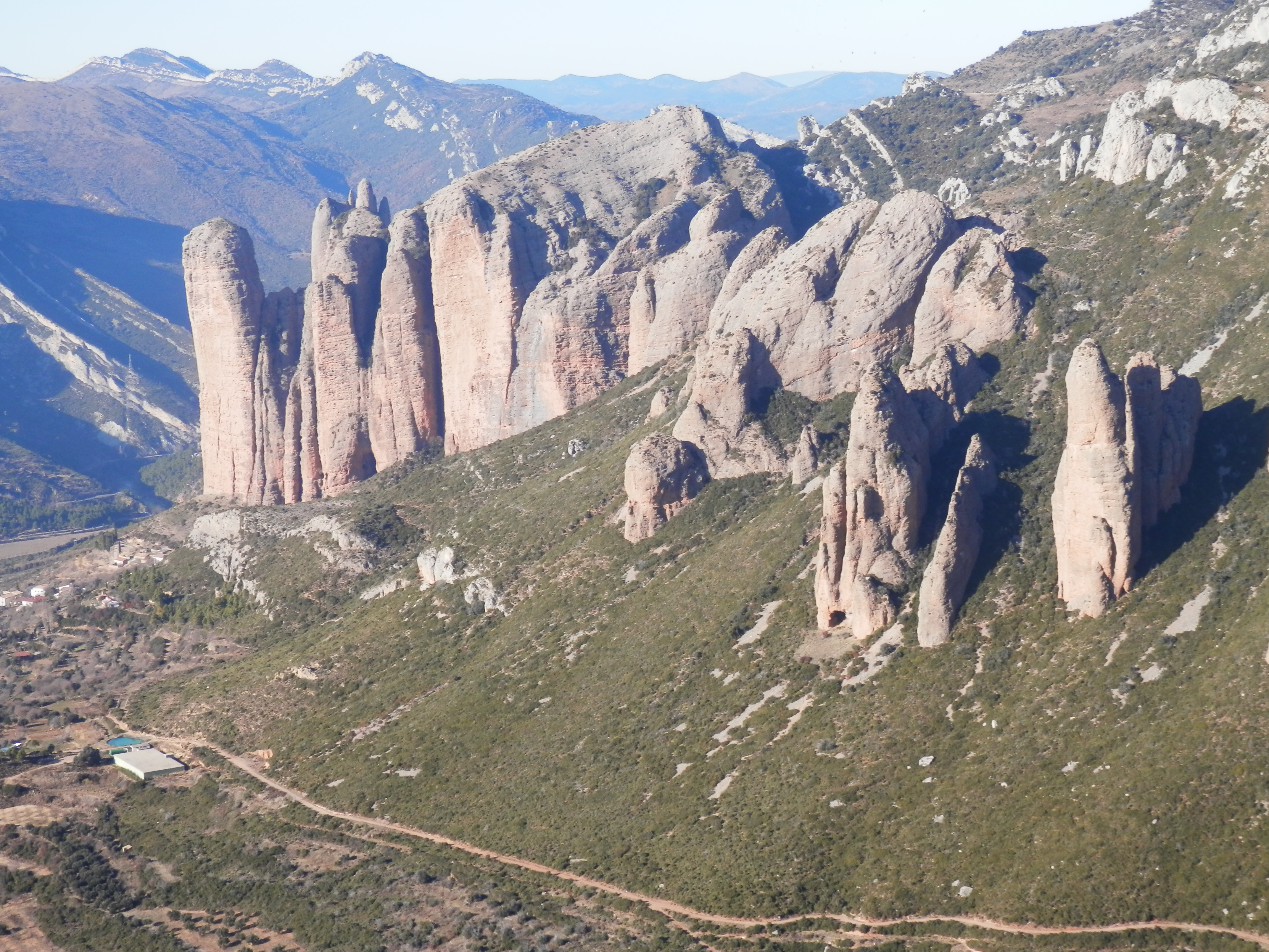 Mallos de Riglos desde el macizo d'os Fils